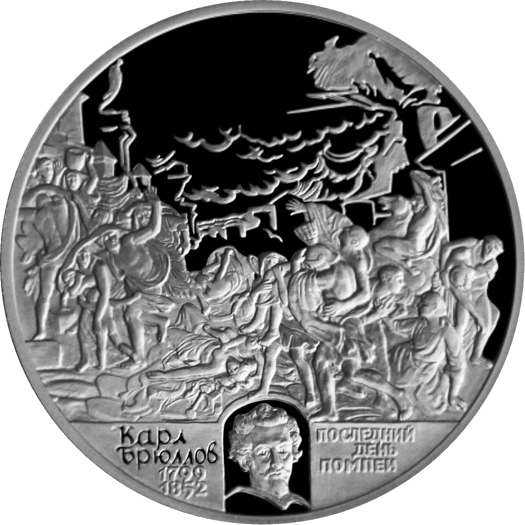 Монета Банка России — Серия: «Выдающиеся личности России», 200-летие со дня рождения К.П. Брюллова (2), 2 рубля, реверс.